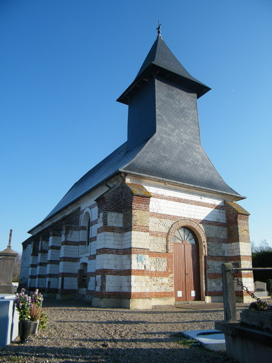 église paroissiale saint-Quentin à Saint-Quentin-en-Tourmont